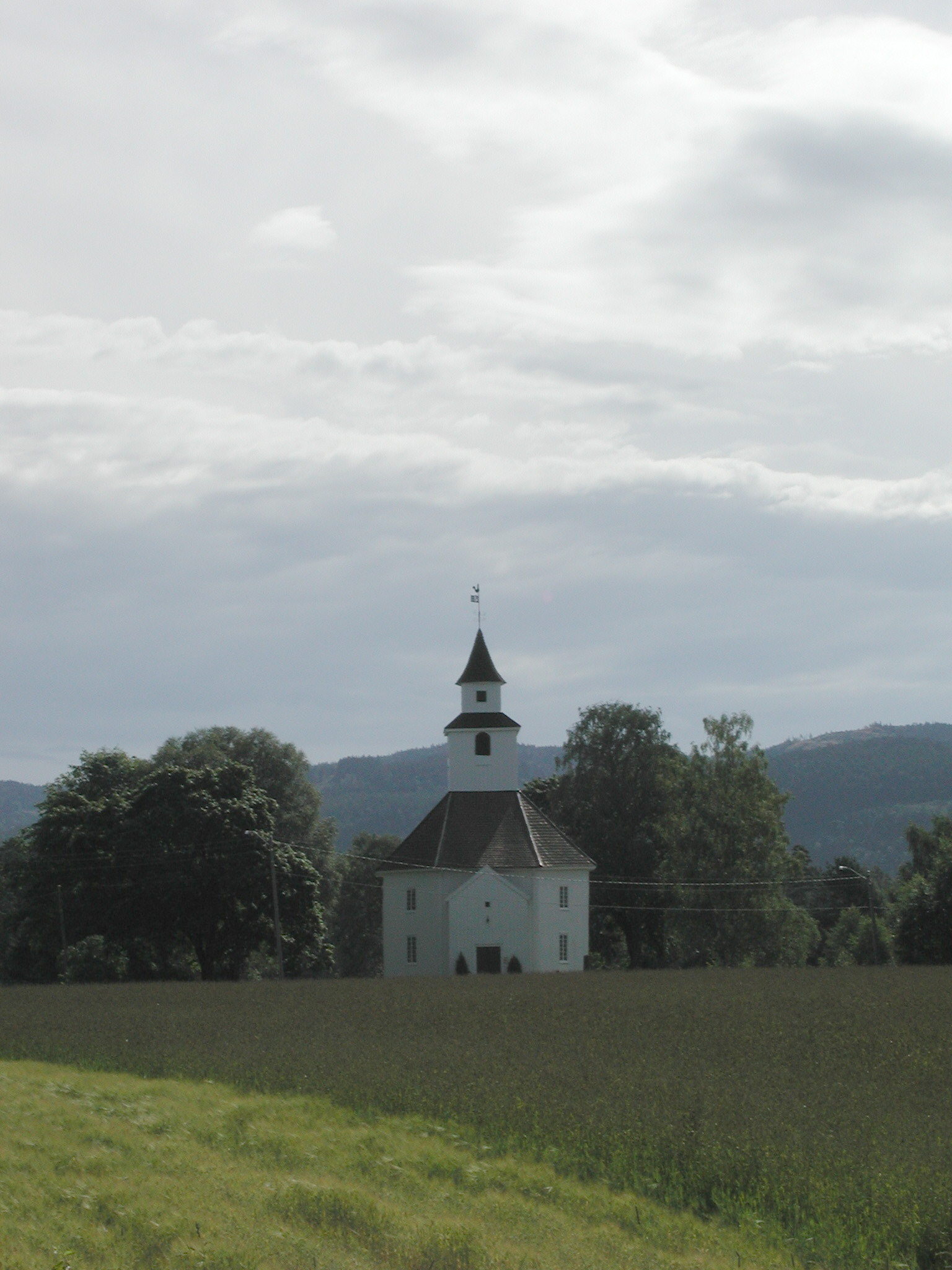 Hornnes kirke